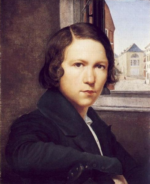 Philipp Hoyoll, Sebstporträt, Type of Object: Painting Technique: oil on canvas Measurements: 50,5 x 41,5 cm )